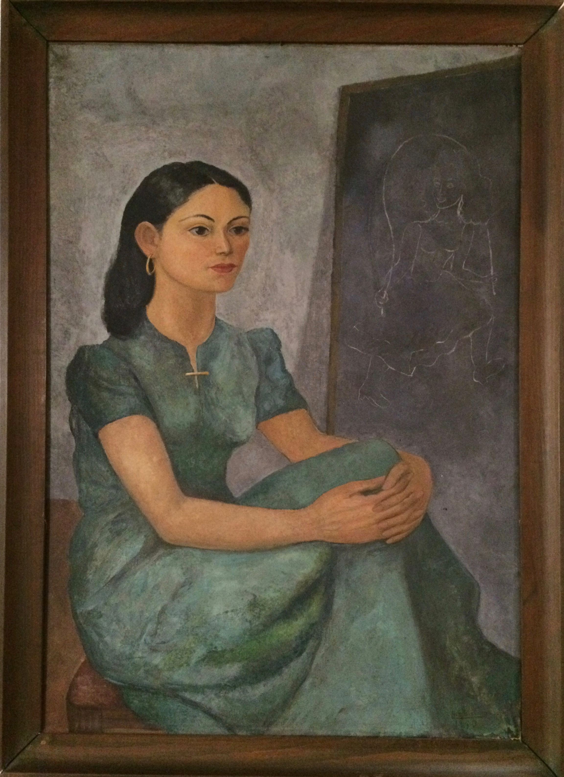 Autorretrato como Maestra Rural 1940 - Luz Fabila